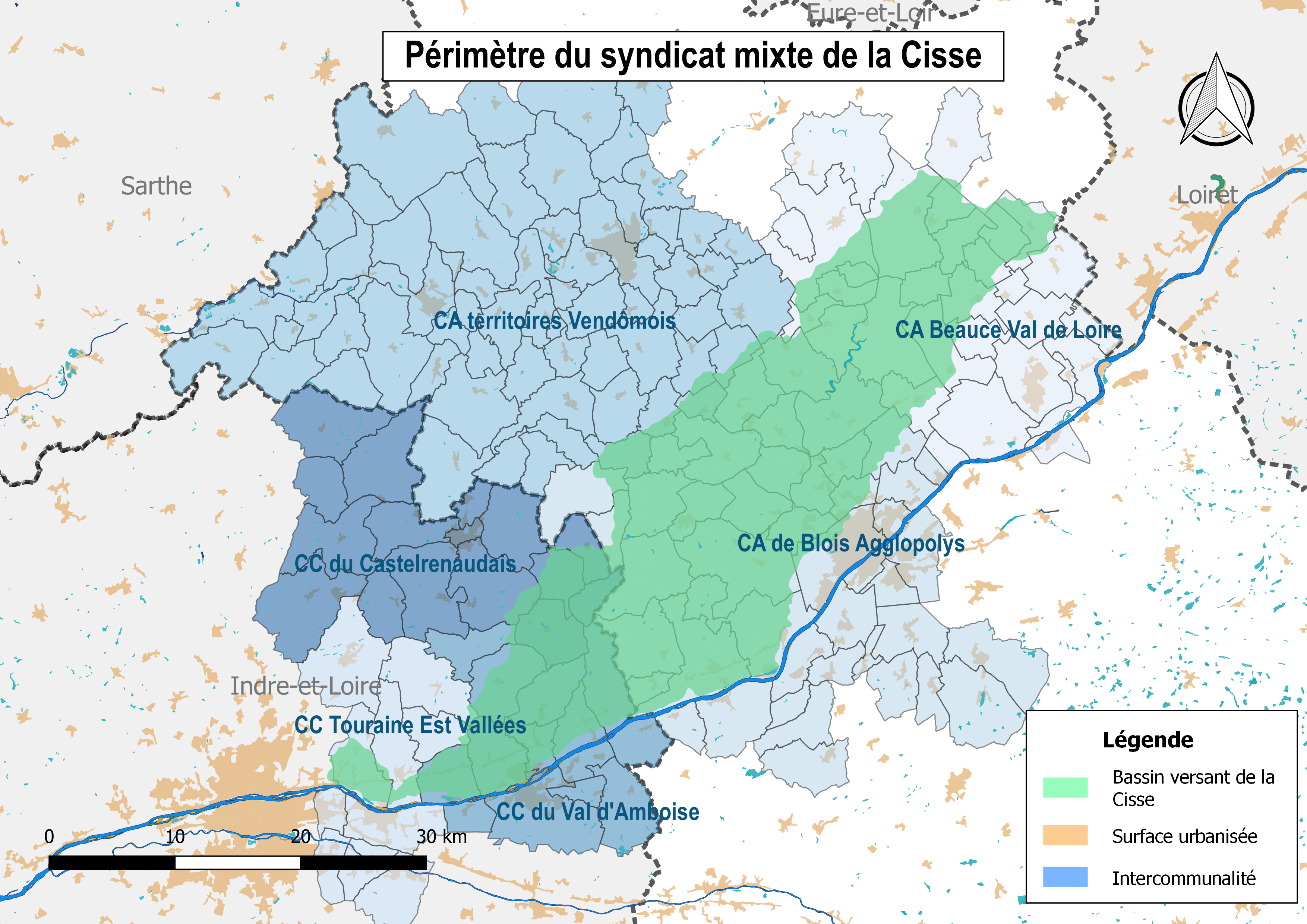 Carte du périmètre de compétences du syndicat mixte du bassin de la Cisse